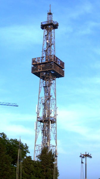 Парашютная вышка на Приморском парке в Баку